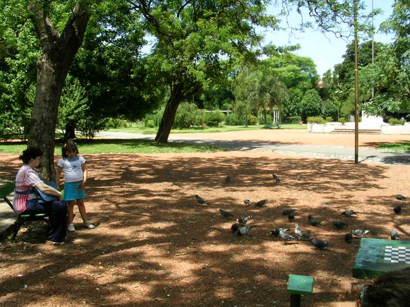 Imagen de Parque Chacabuco tomada por mí (Nicolás Lichtmaier).